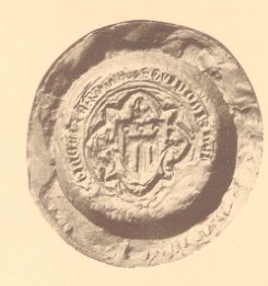 Vít z Boulogne